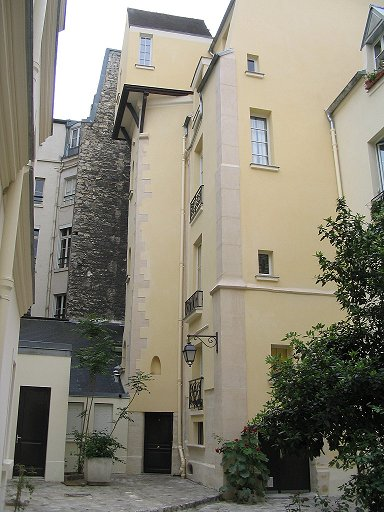 Ancien college Fortet à Paris, Ve, batiment subsistant dit Tour Calvin.